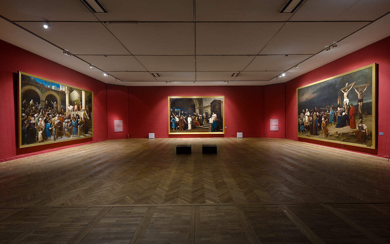 Template:Künstlerhaus Wien / Bécs Exhibition "Munkácsy. Magic & Mystery" 2012 © Künstlerhaus